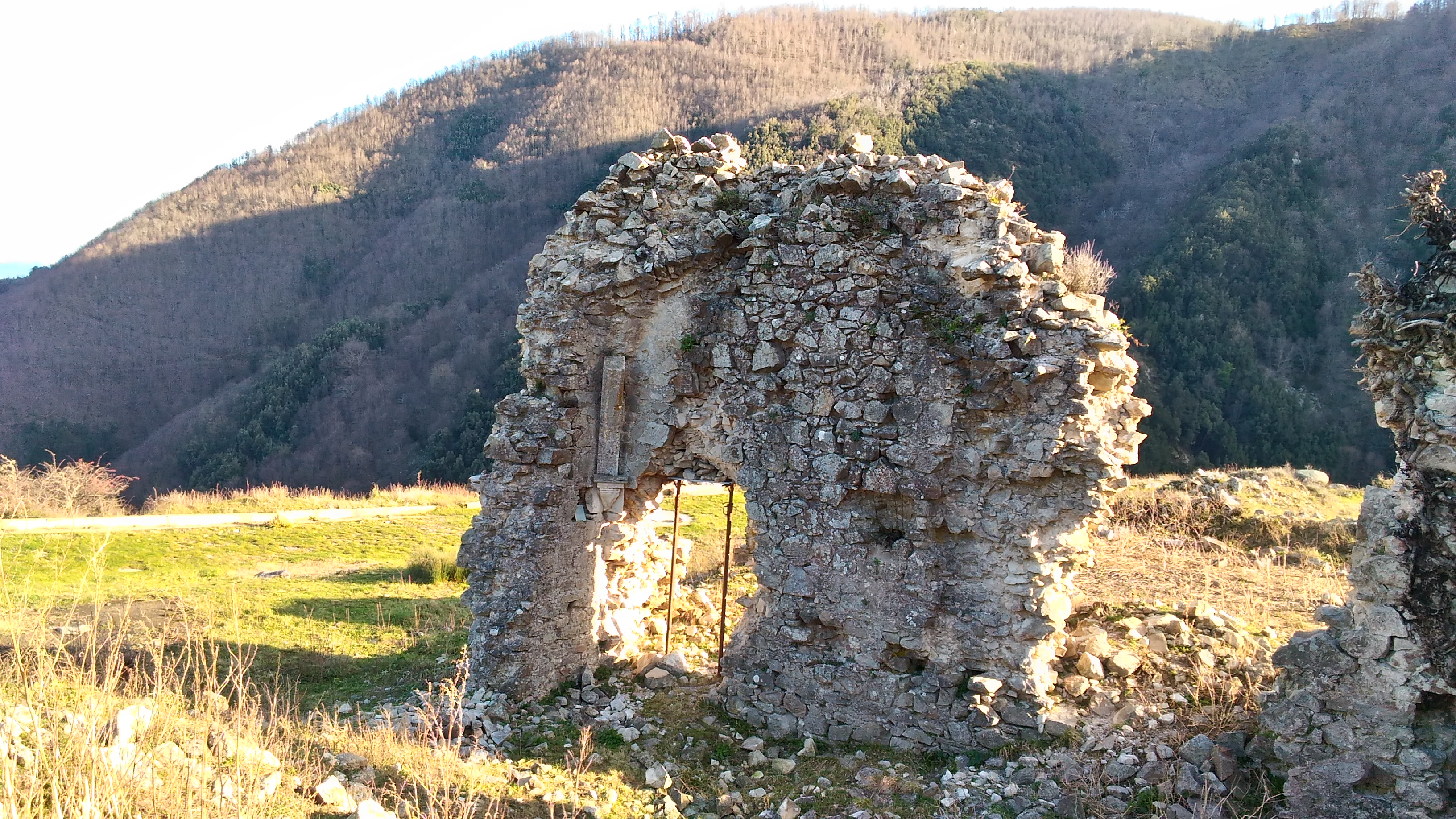 ruderi chiesa